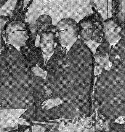 Jura de José Mazar Barnett como ministro de obras públicas.